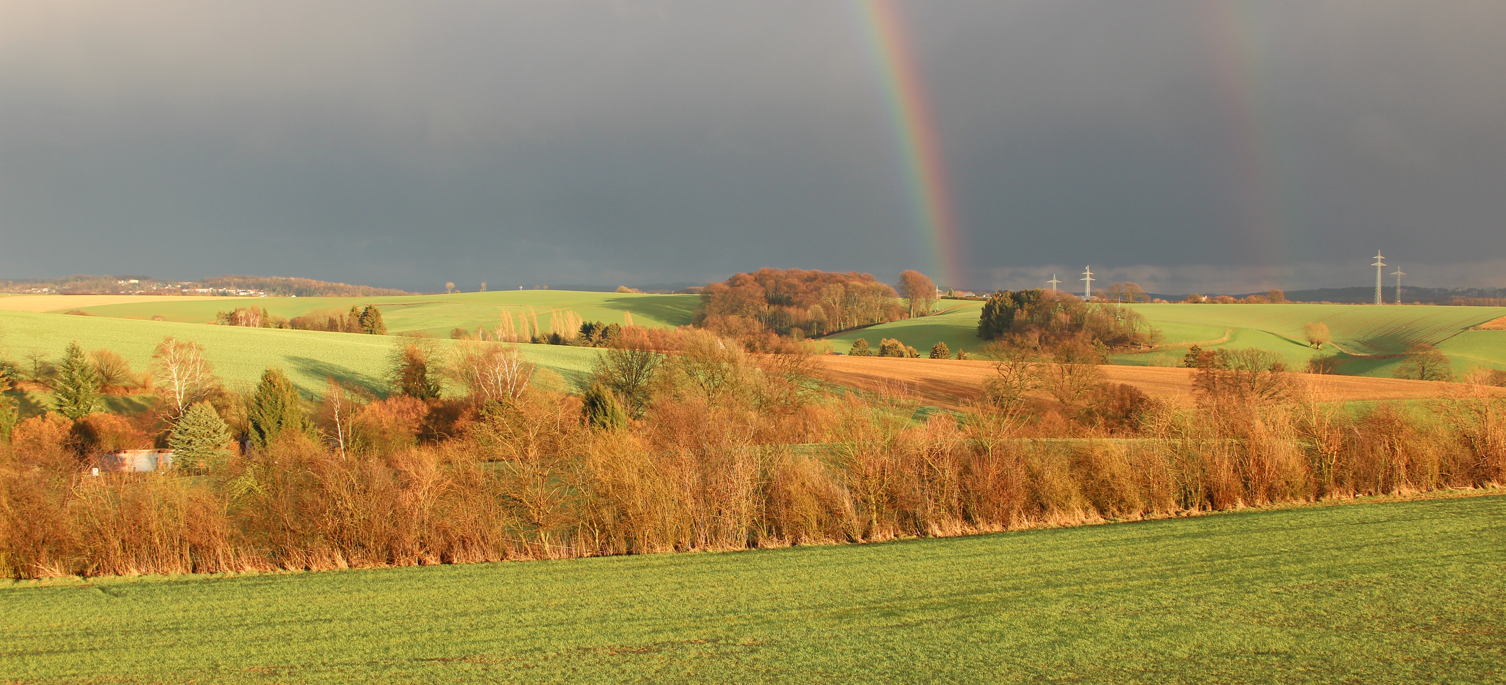 Uitzicht over de oostelijke gebieden van Obmettmann in Duitsland